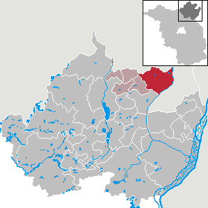 Brüssow in Brandenburg (Country) - District Uckermark